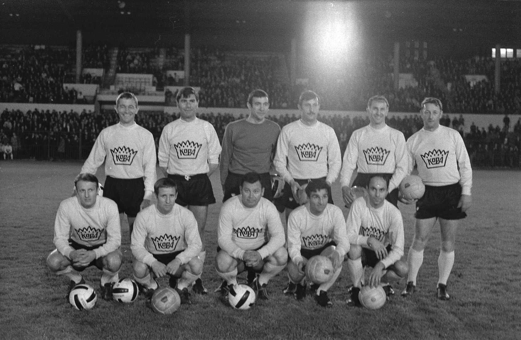 Stadium municipal de Toulouse, 1bis allées Gabriel-Biénès. 6 Mai 1969. Vue des anciens joueurs de l'équipe de France lors de la coupe du monde en Suède en 1958 : Armand Penverne, Jean-Jacques Marcel, Claude Abbes, Jean Wendling, Robert Mouynet, Robert Jonquet, Pierre Bernard, Raymond Kopa, Just Fontaine, Roger Piantoni, Paul Sauvage.